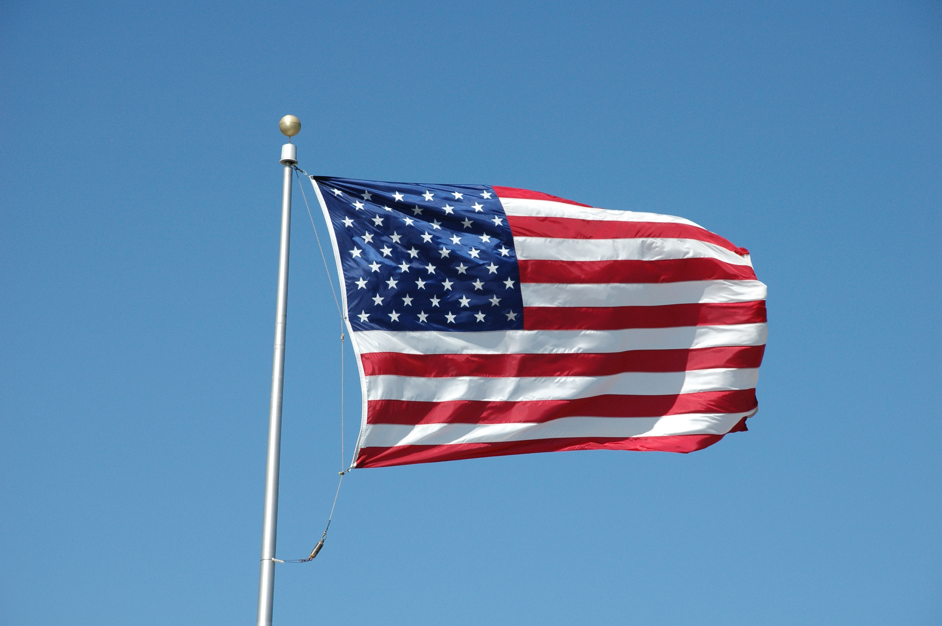 PBBP BART